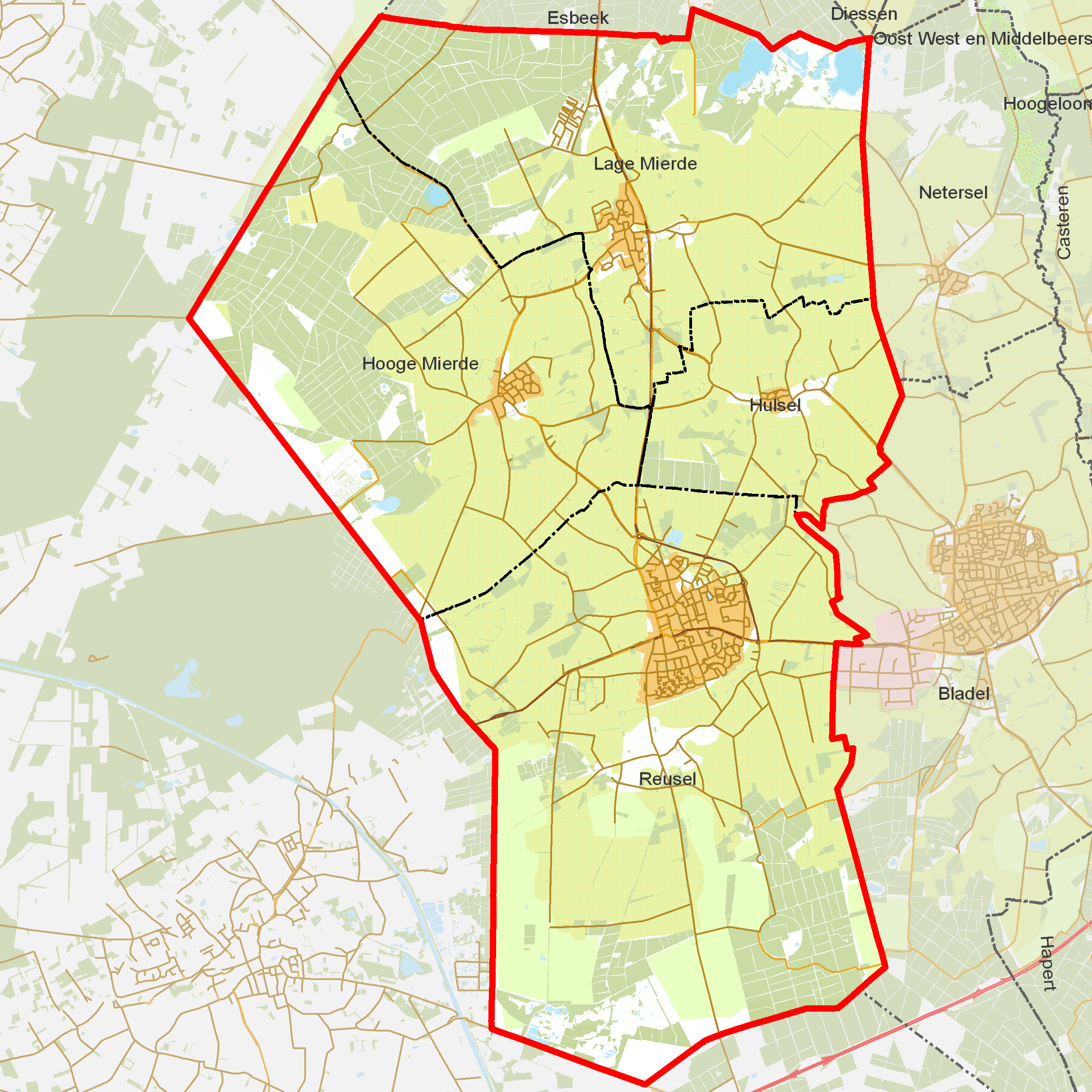 BAG woonplaatsen - Gemeente Reusel-De Mierden.png